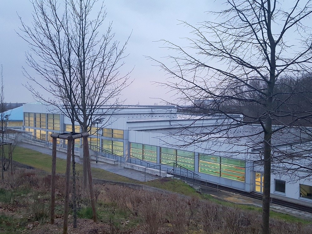 Marienbad Brandenburg - Schwimmhallemit 50-Meter-Wettkampfbecken mit Capriodach